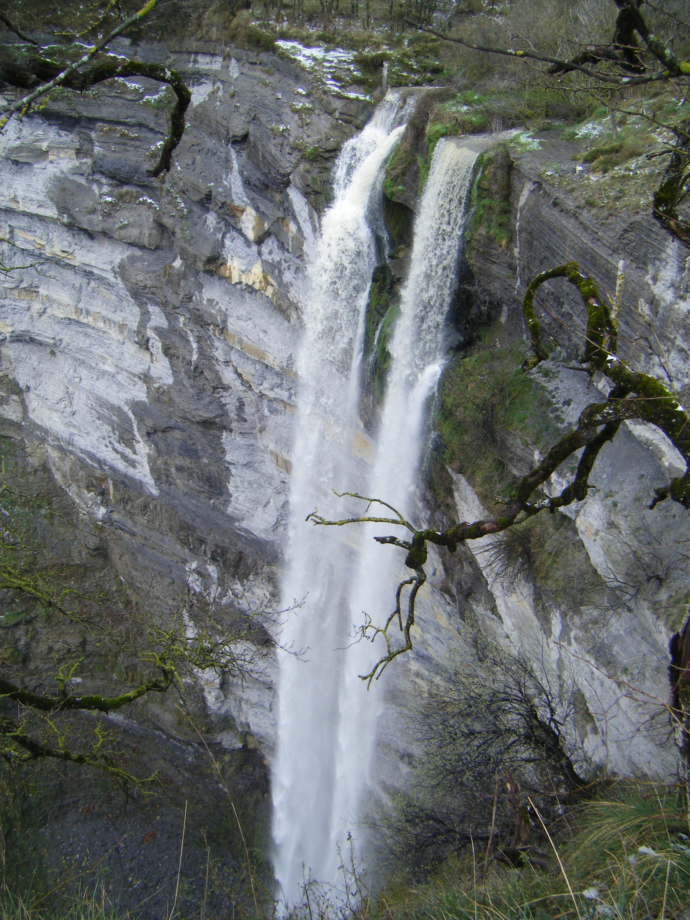 Salto de agua de Gujuli(Álava)